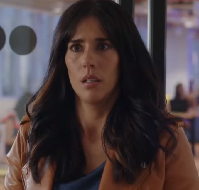 Gianella Neyra en la película Recontraloca en 2019